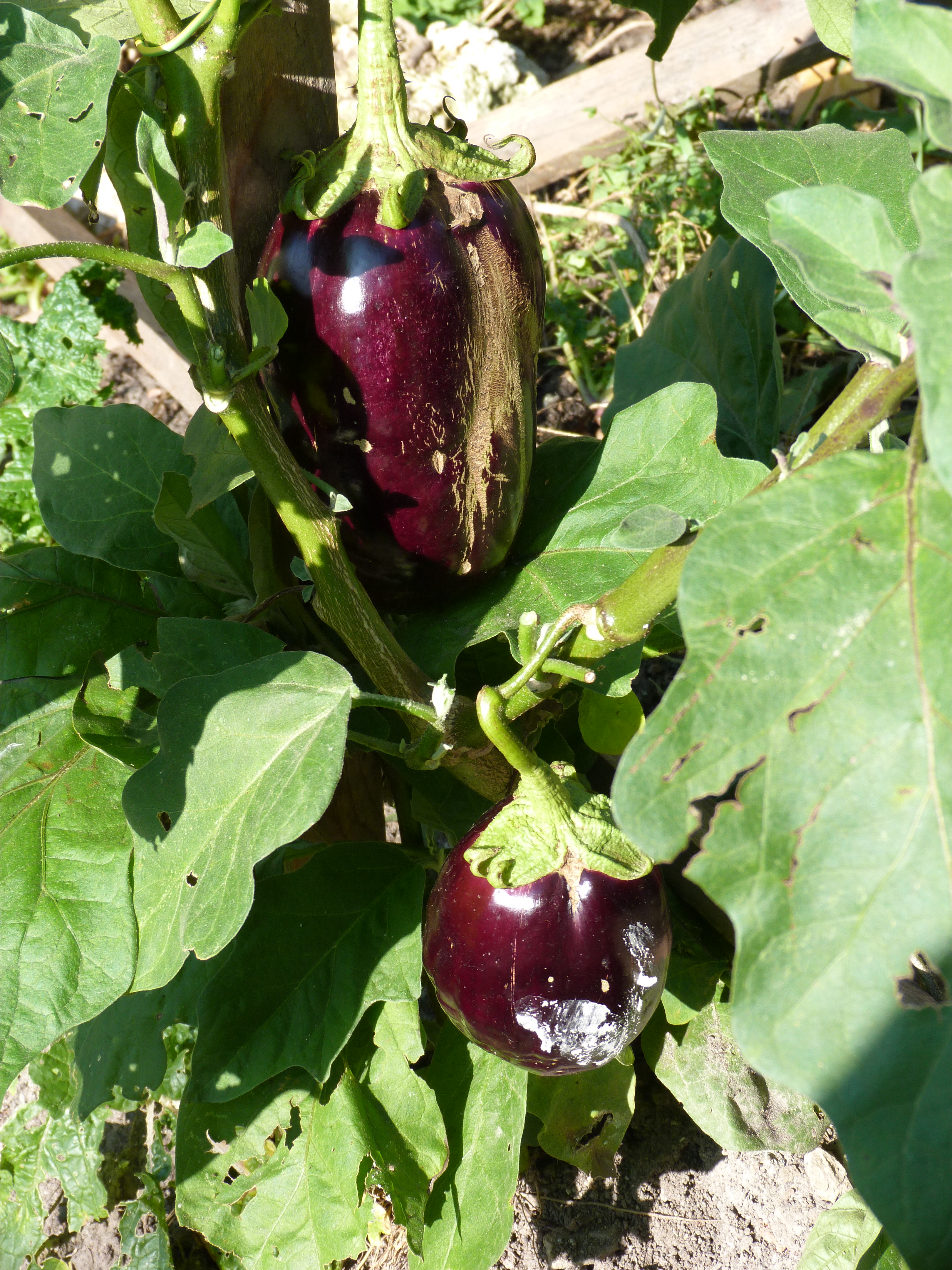 A felvétel 2014. október 19-én készült Budapesten, Budán. Padlizsán. ©© Derzsi Elekes Andor, Budapest, 2014, A kép és filmfelvételek egészben, vagy részletekben másolását, bármilyen úton történő sokszorosítását és felhasználását a szerző ellenérték nélkül, jogutódjaira is kihatóan megengedi. Az engedély kiterjed a kereskedelmi célú hasznosításra is. Kéri azonban nevének feltüntetését a felhasználás során. A Metapolisz sorozat valamennyi képe és filmje Creative Commons alatti valamint kereskedelmi - for profit - célra is felhasználható. Ajánlott hivatkozás: Derzsi Elekes Andor: Metapolisz DVD line